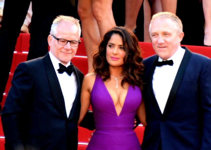 Thierry Frémaux, Salma Hayek et François-Henri Pinault au festival de Cannes